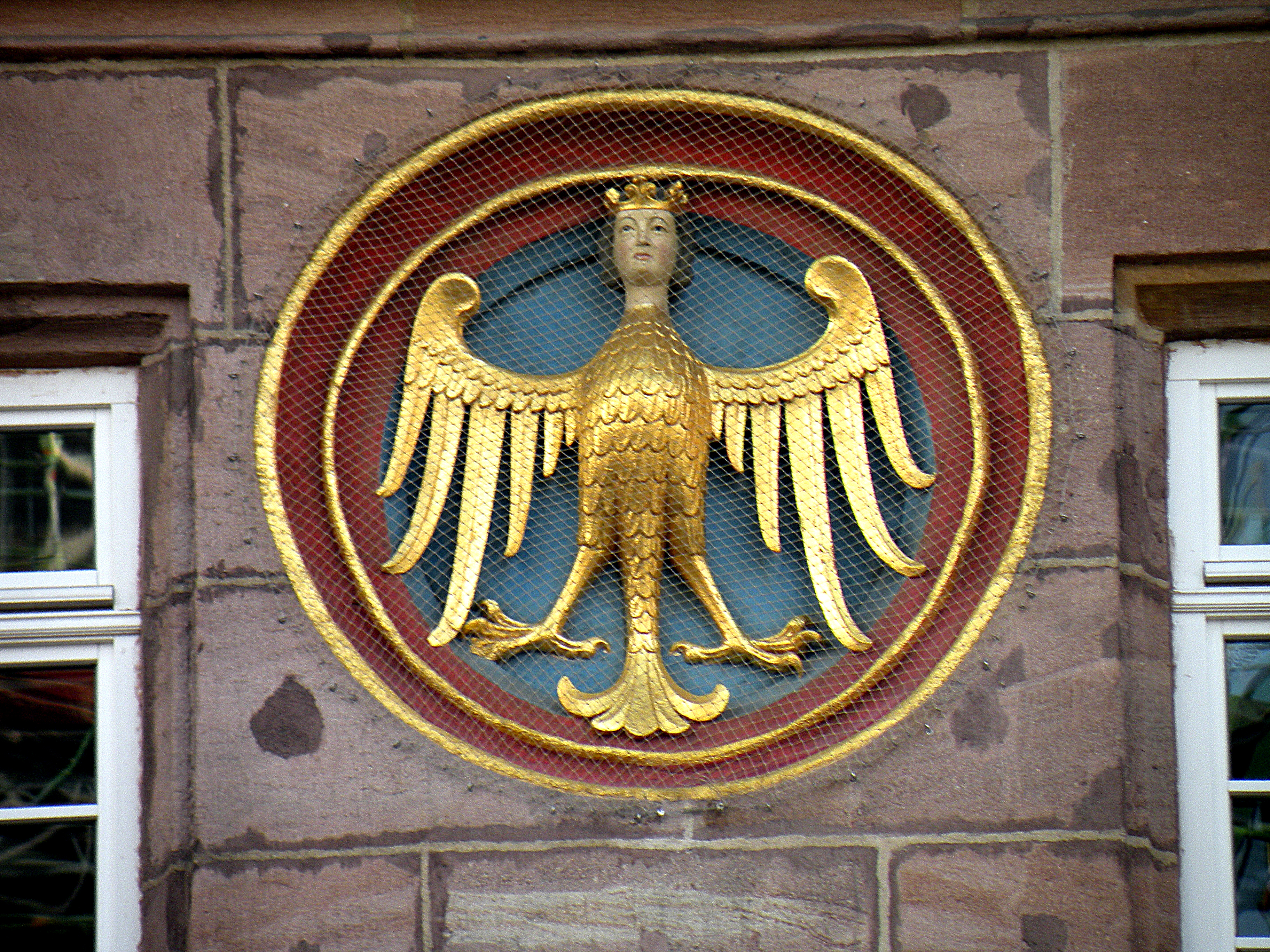 Nürnberg, Haus Weinmarkt 1, Großes Stadtwappen (evtl. um 1332; der Überlieferung nach war das Haus 1332–1340 interimsweise für Ratssitzungen genutzt)